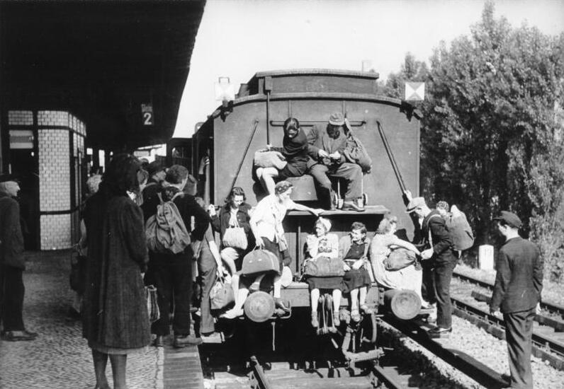 ADN-ZB/Donath Berlin 1947 (Bahnhof Spandau-West) Reiseverkehr in den ersten Nachkriegsjahren. Die Züge sind voll besetzt und auf Puffern und Trittbrettern versuchen die Reisenden, hauptsächlich Hamsterer, Platz zu finden, um aufs Land zu fahren.